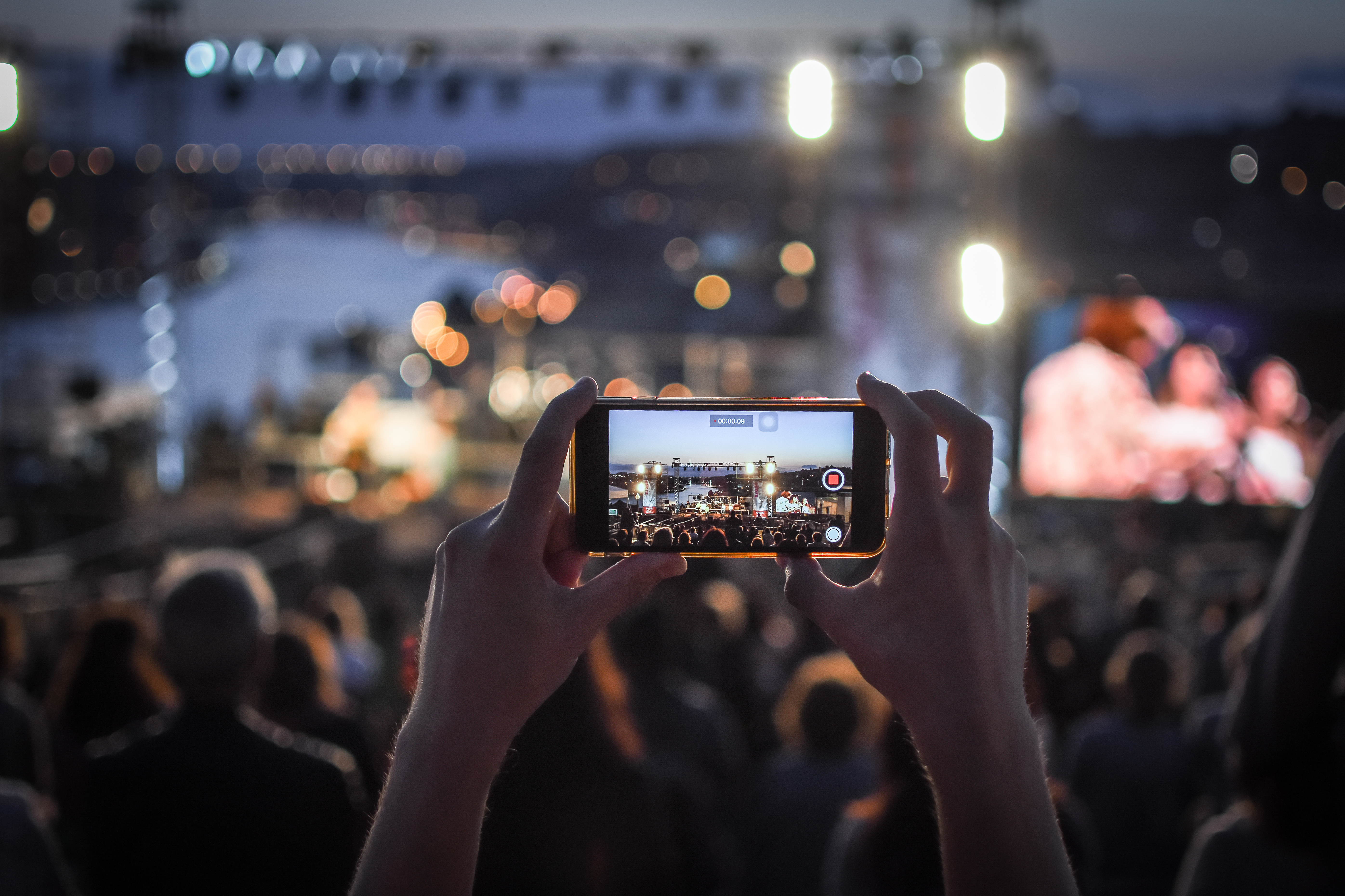 Fotografia do GodTellers 2019